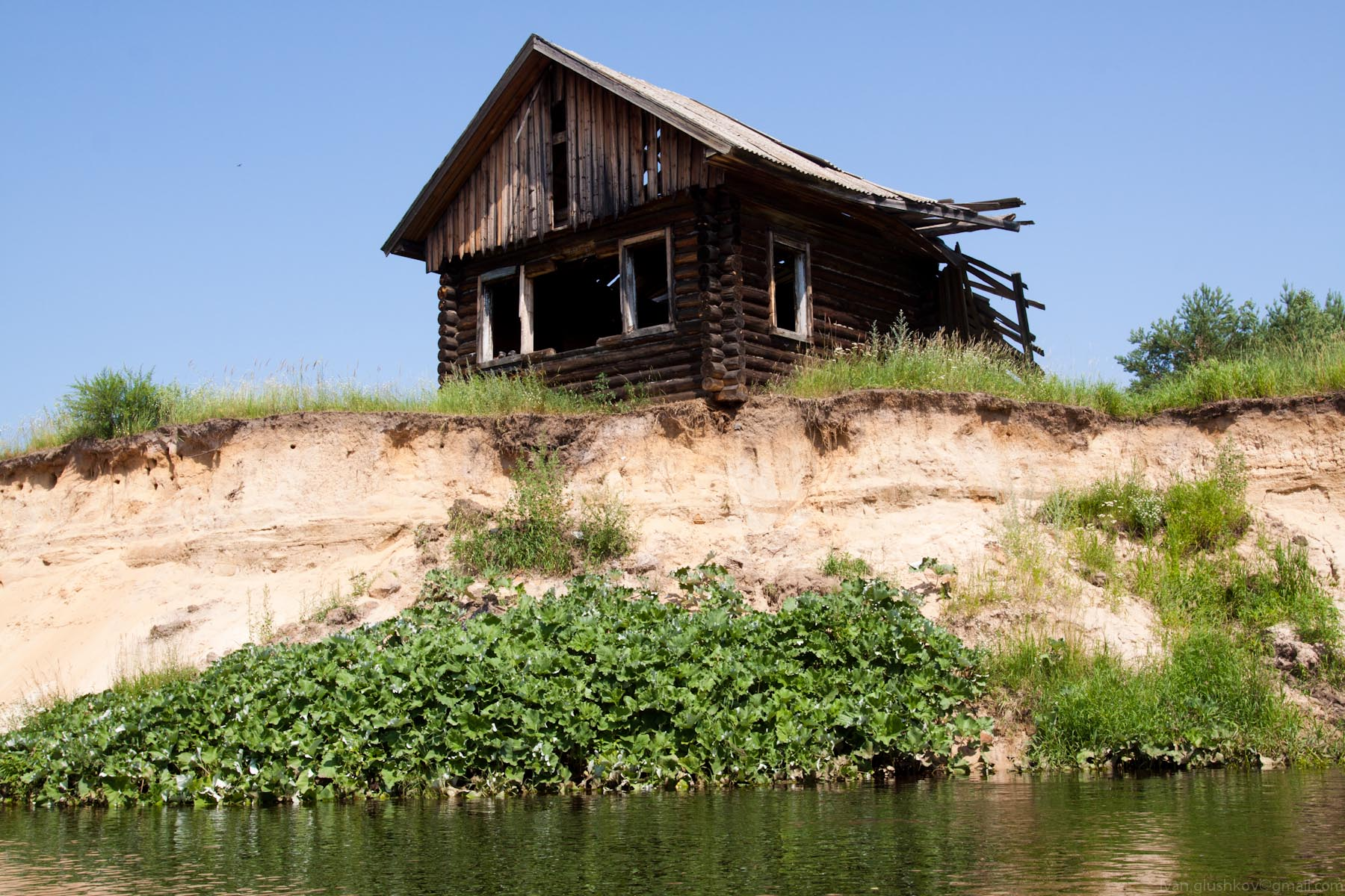 река Большой Кундыш в среднем течении